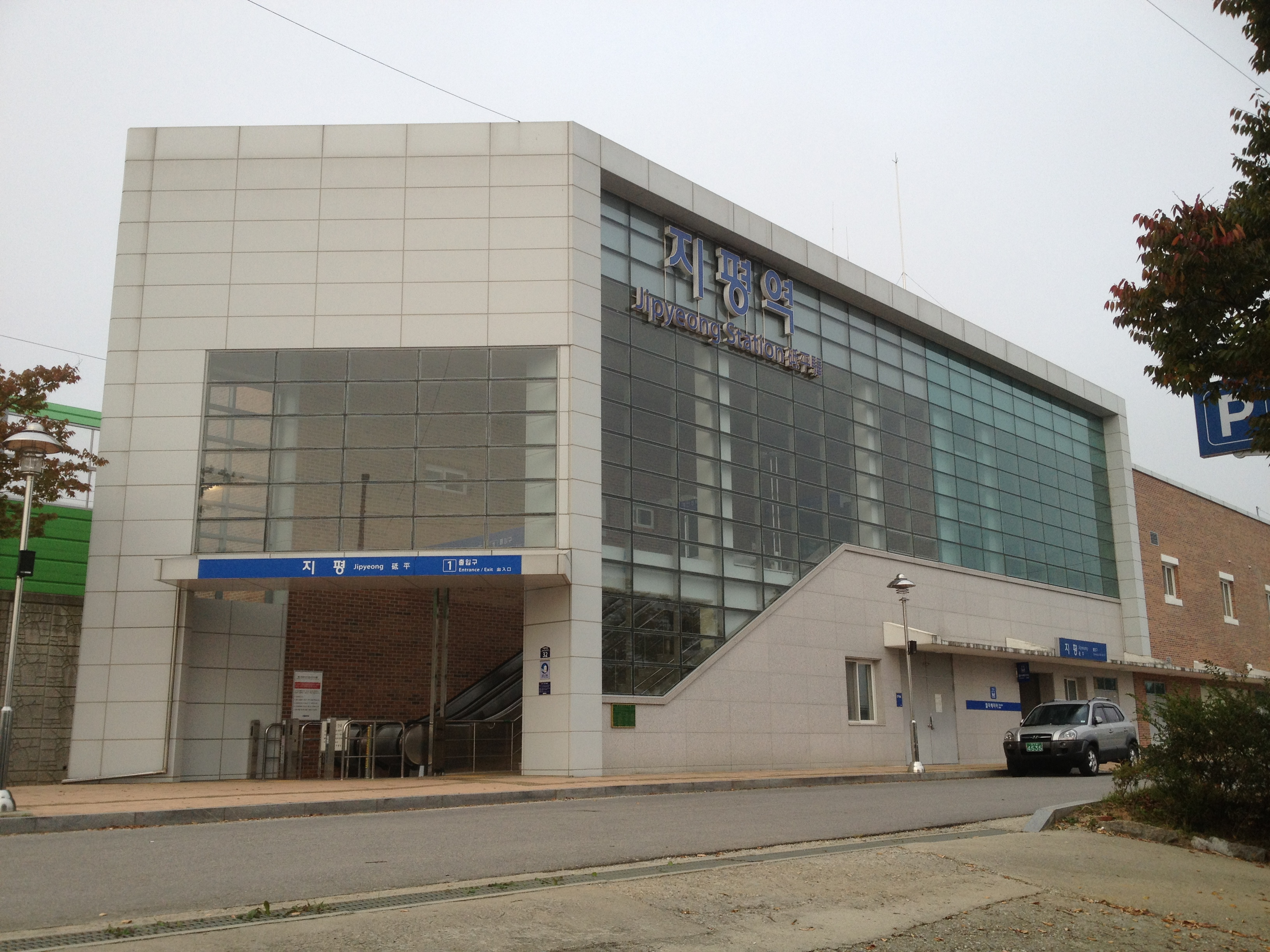 지평역 외부 모습